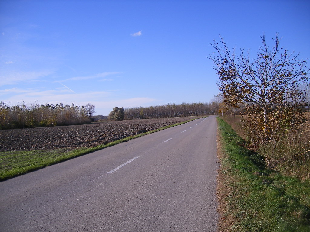 Csilizpatas - a Bősre vezető országút